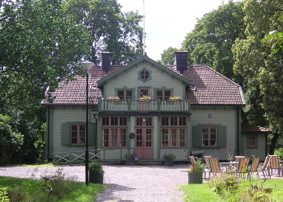 Herrängens Gård vid Långsjön